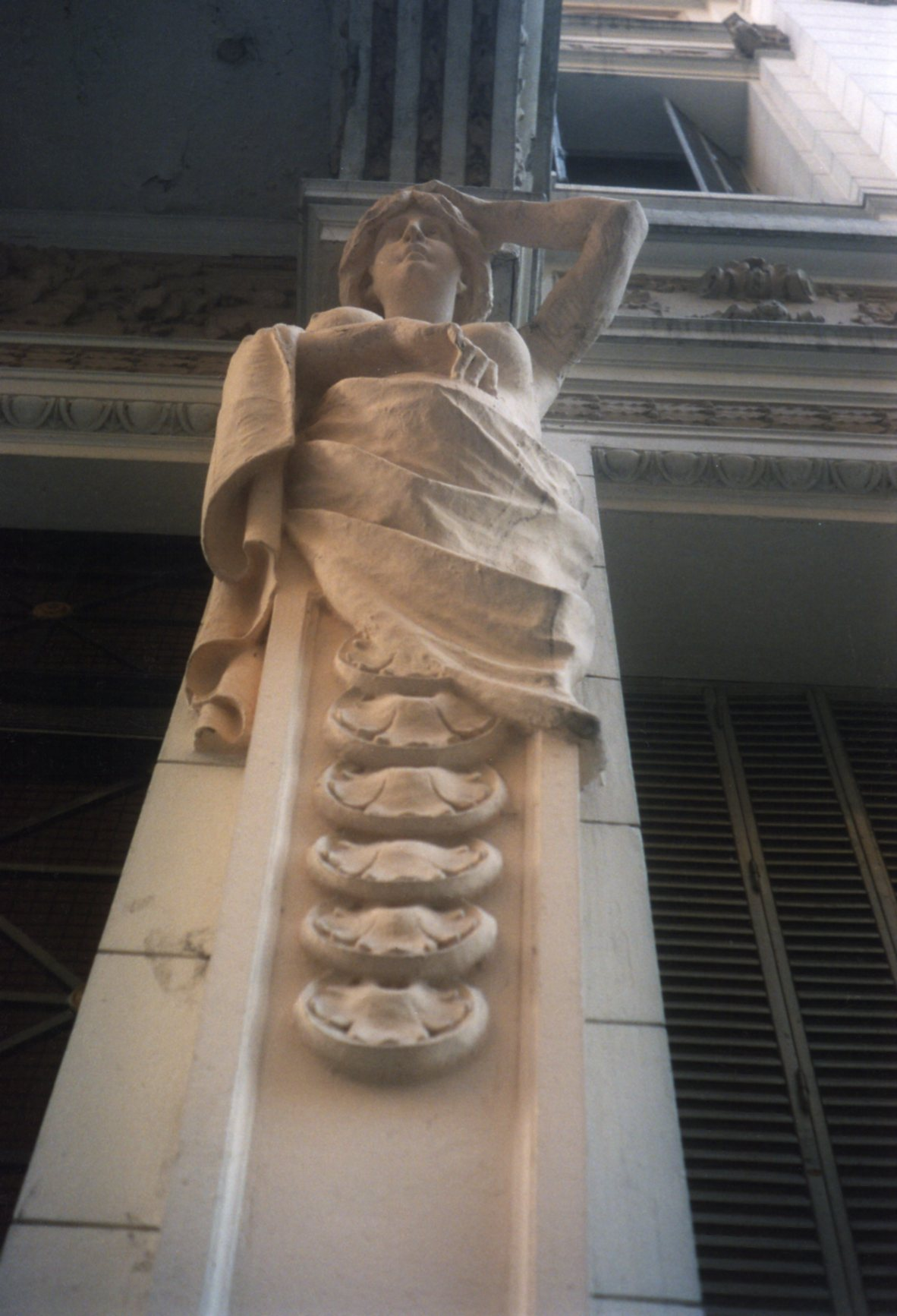 Ornamento arquitectónico en la puerta de la ESCCP, Buenos Aires, Argentina.